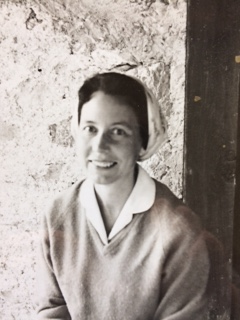 Photo de famille d’Anne Perrier, 1960